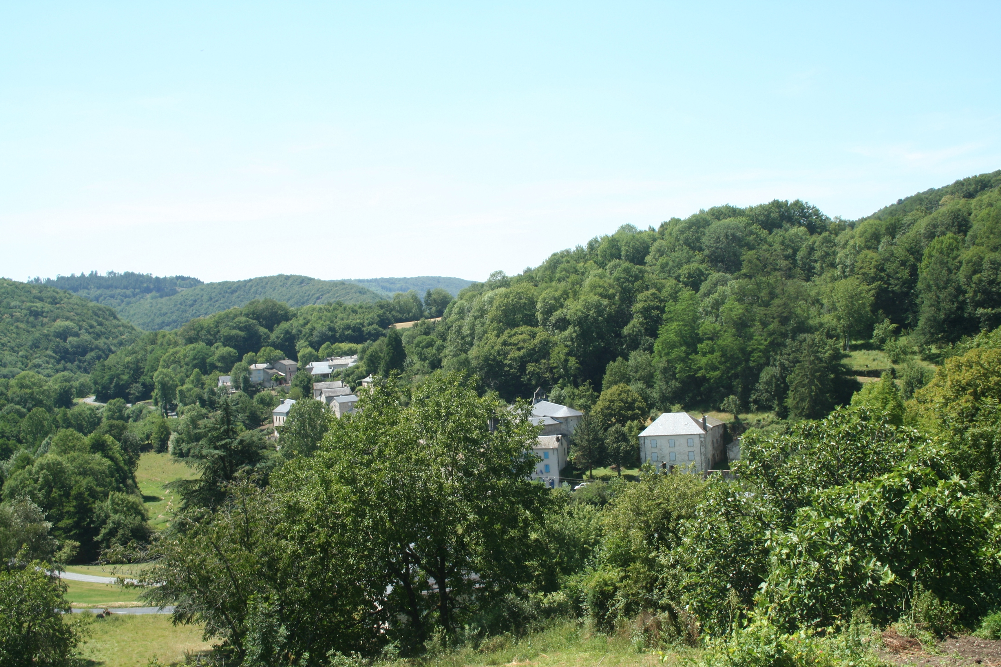 Ferrières (Tarn) - vue générale.